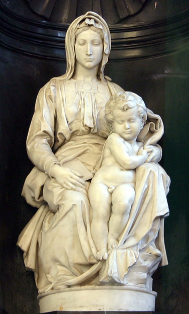 Detall de la Madonna de la catedral de Bruges